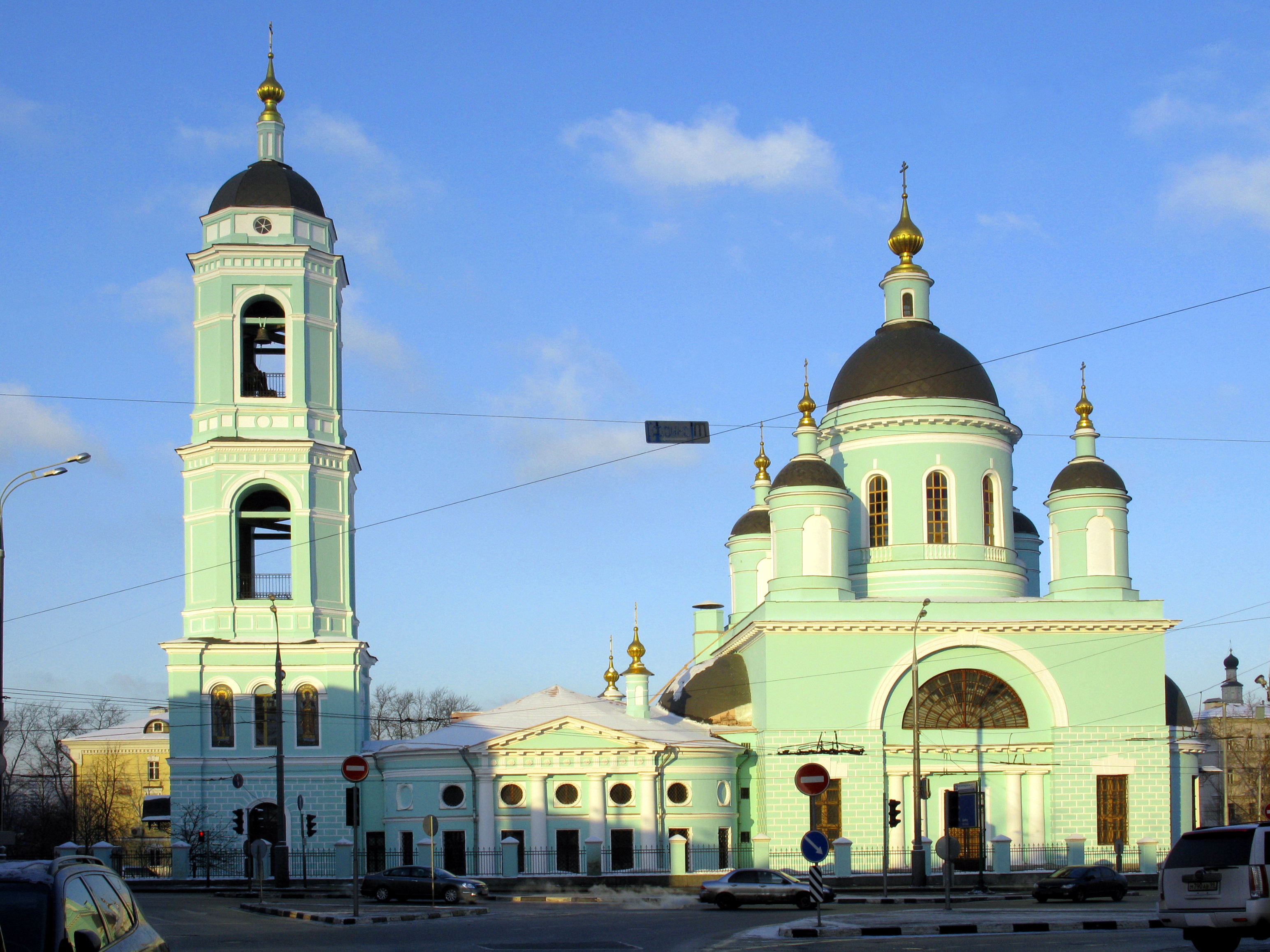 Храм преподобного Сергия Радонежского (Троицы Живоначальной) в Рогожской слободе, что в Гонной